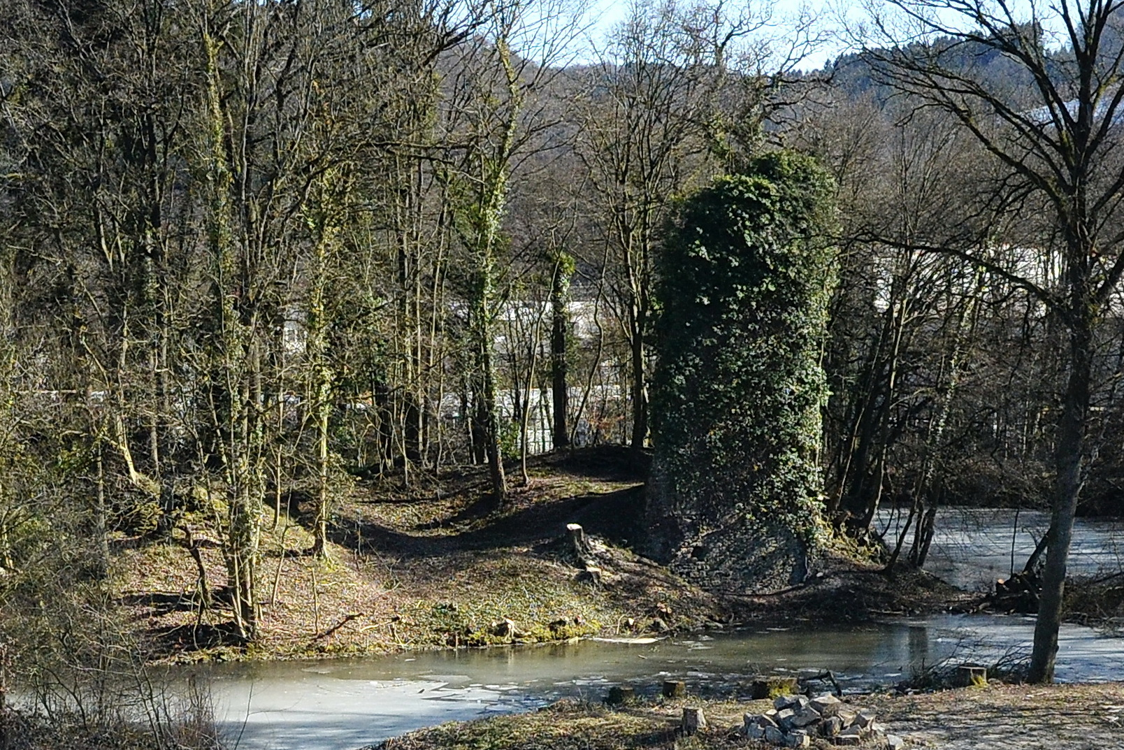 alte Burgruine Großbernsau, Overath